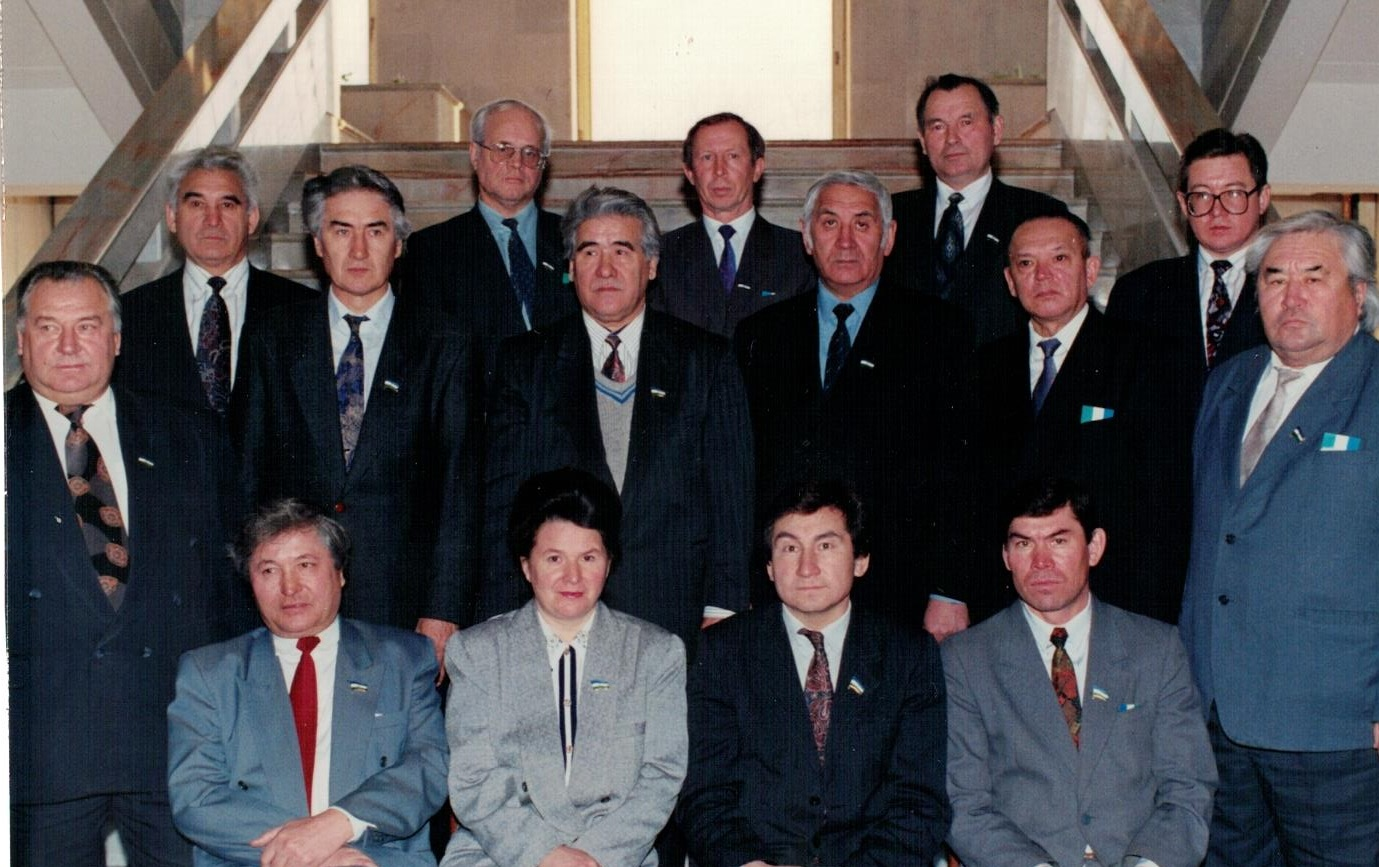 Депутаты Государственного Собрания Республики Башкортостан. 1-й созыв. Председатель комитета З. Еникеев с членами своего комитета